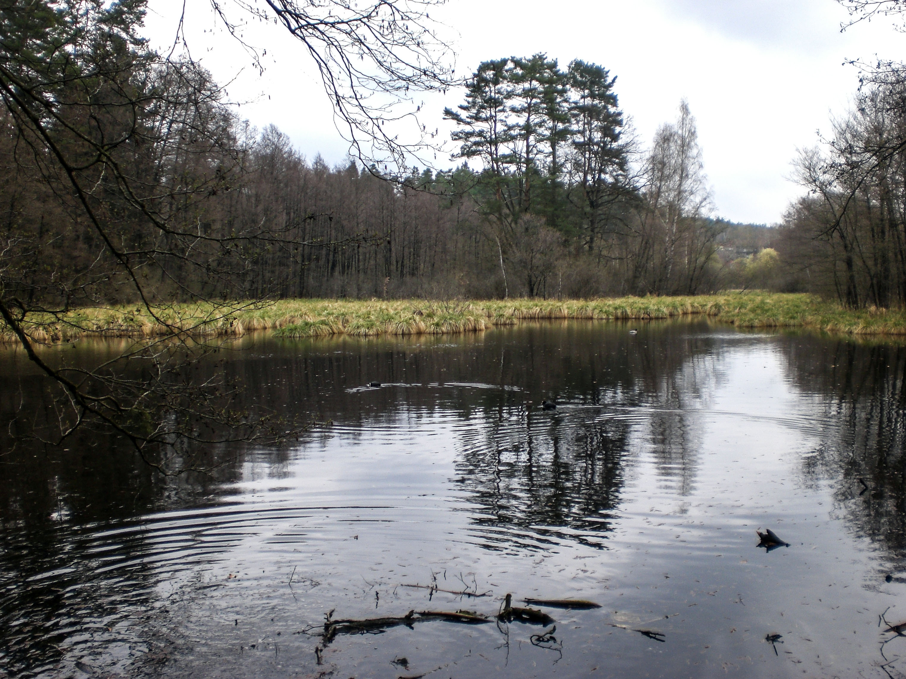 Schwarzenbrucker Moor